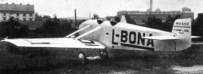 Avia BH-12 (Flight, 06-1924)